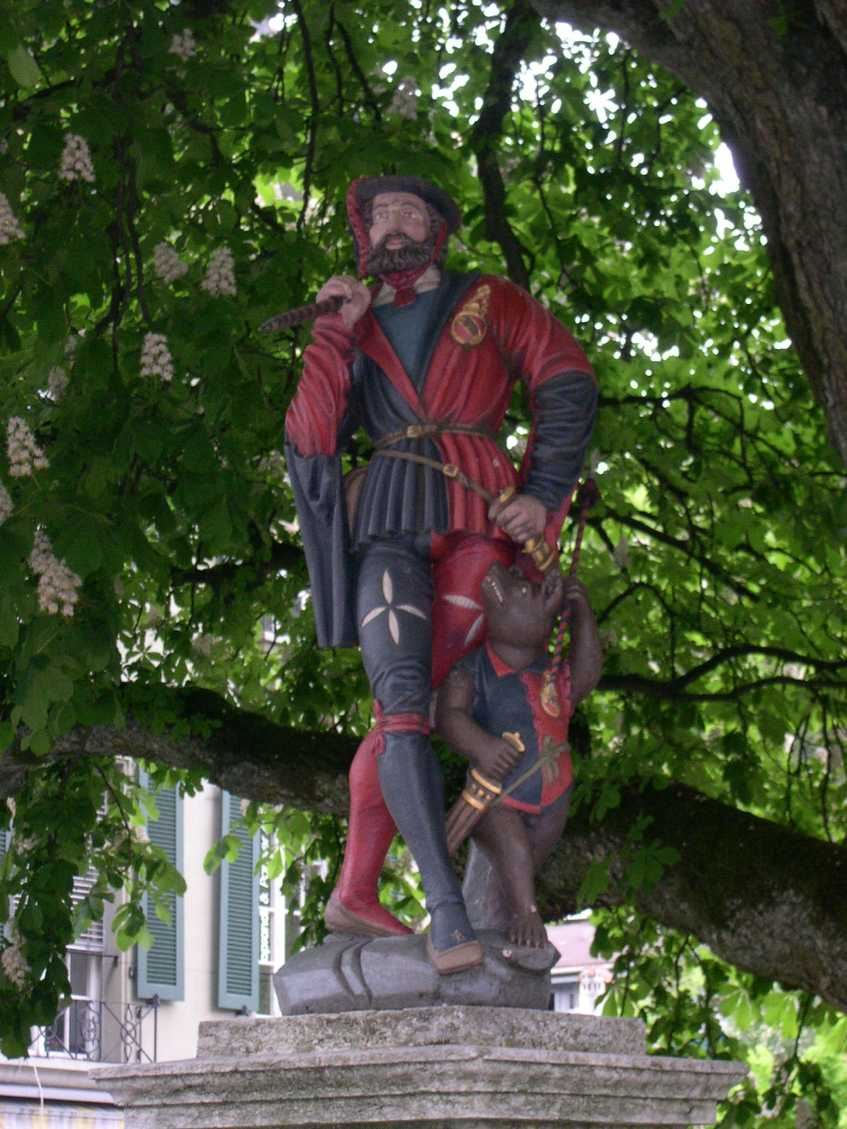 Die Figur des Läuferbrunnens in Bern